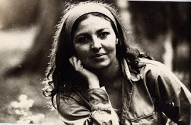 جمیله ندایی - 1355